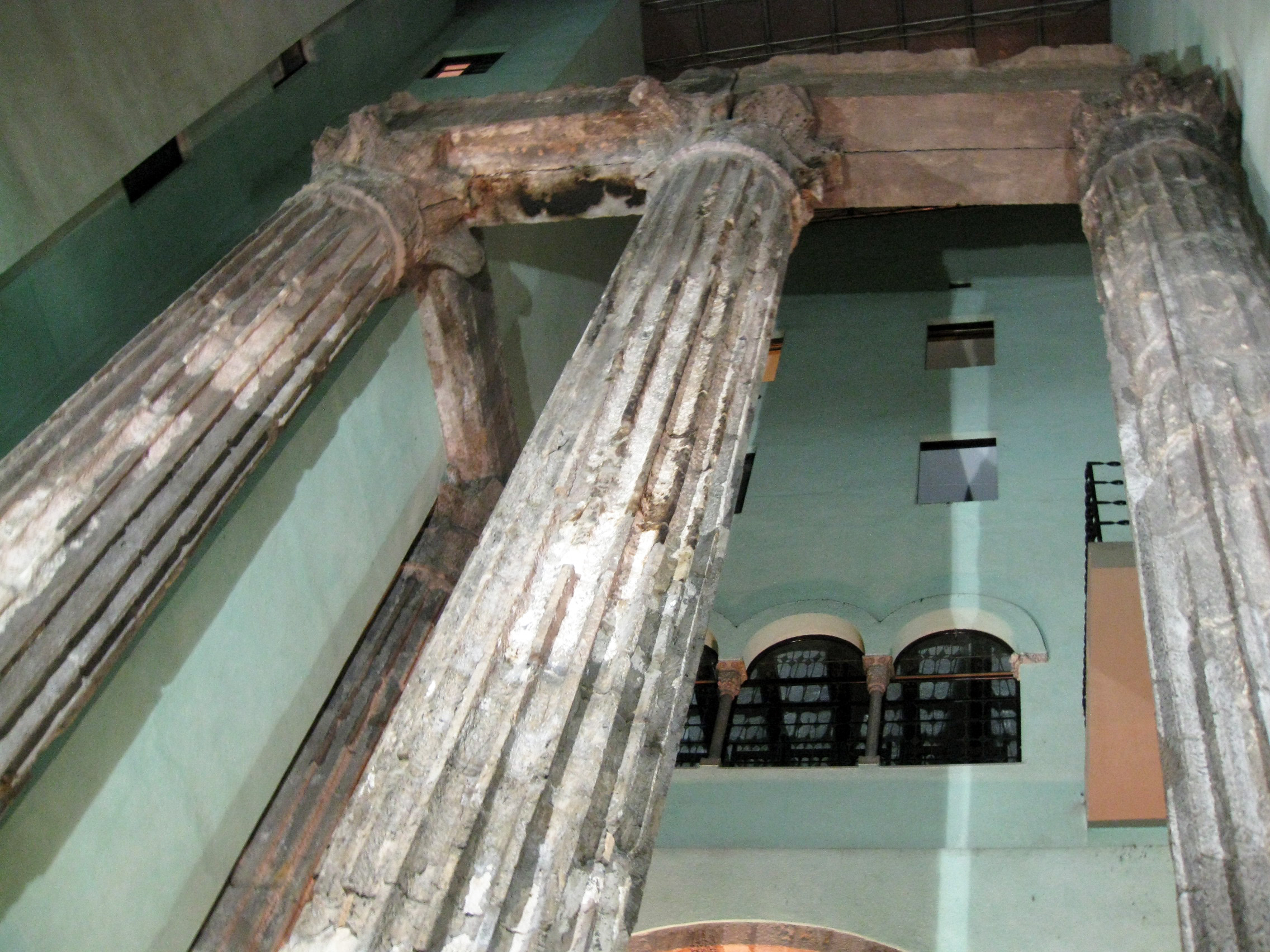 Columnes del temple d'August, al pati del Centre Excursionista de Catalunya, al carrer del Paradís, al barri Gòtic de Barcelona